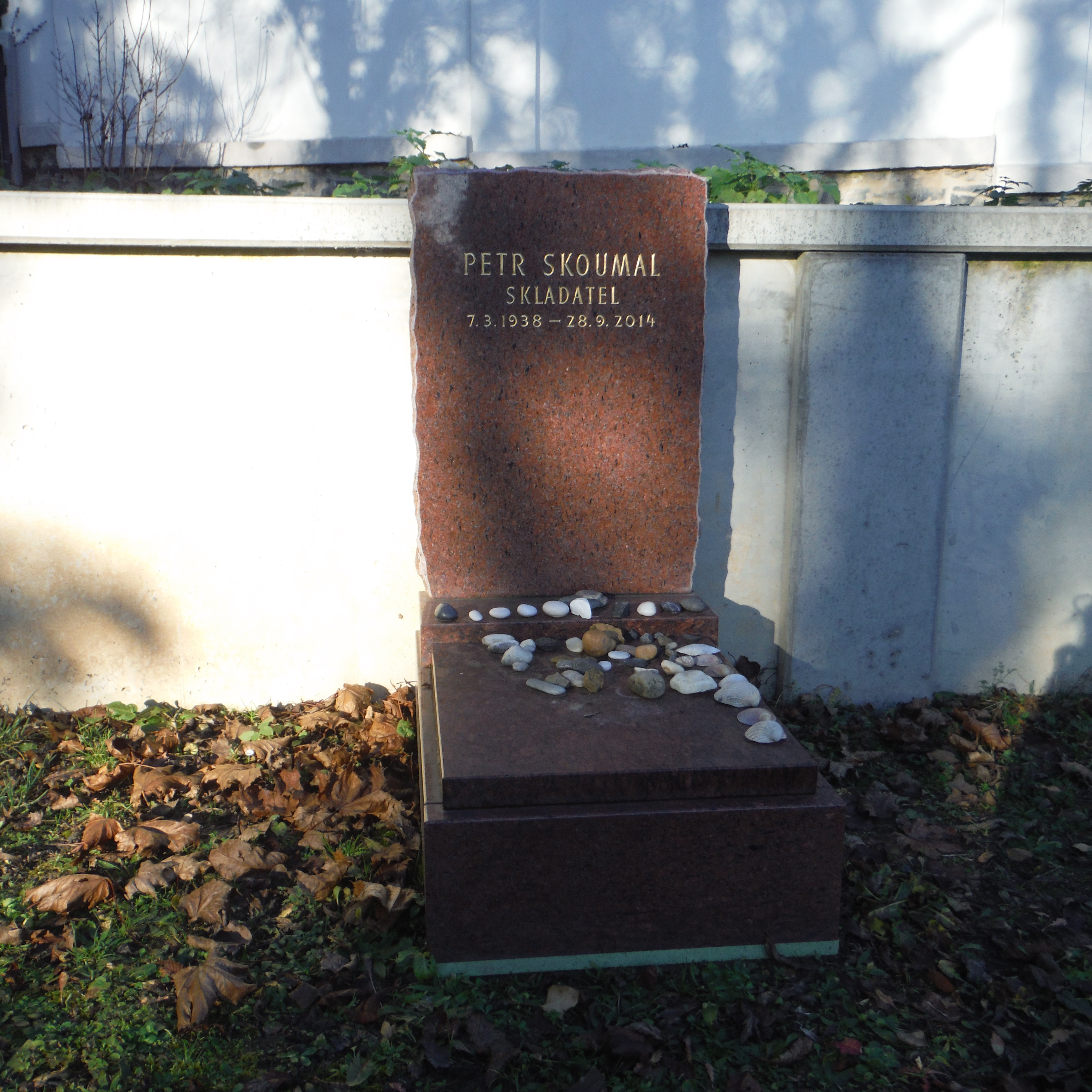 hrob